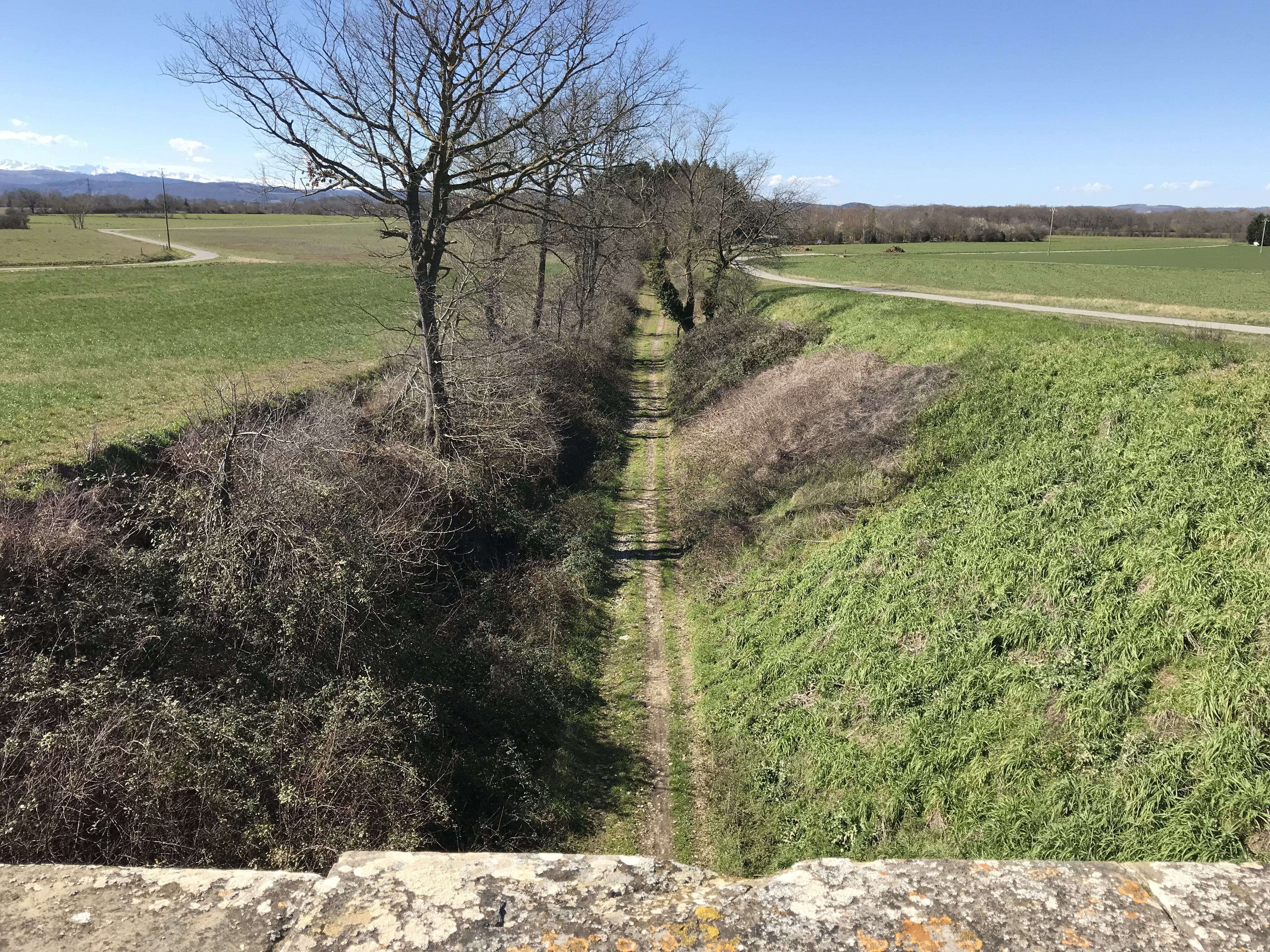 Vue sur l'ancienne ligne de chemin de fer Pamiers-Limoux, portion en déblai, commune de Le Carlaret (Ariège, France). Vue vers l'ouest (terminus Pamiers).